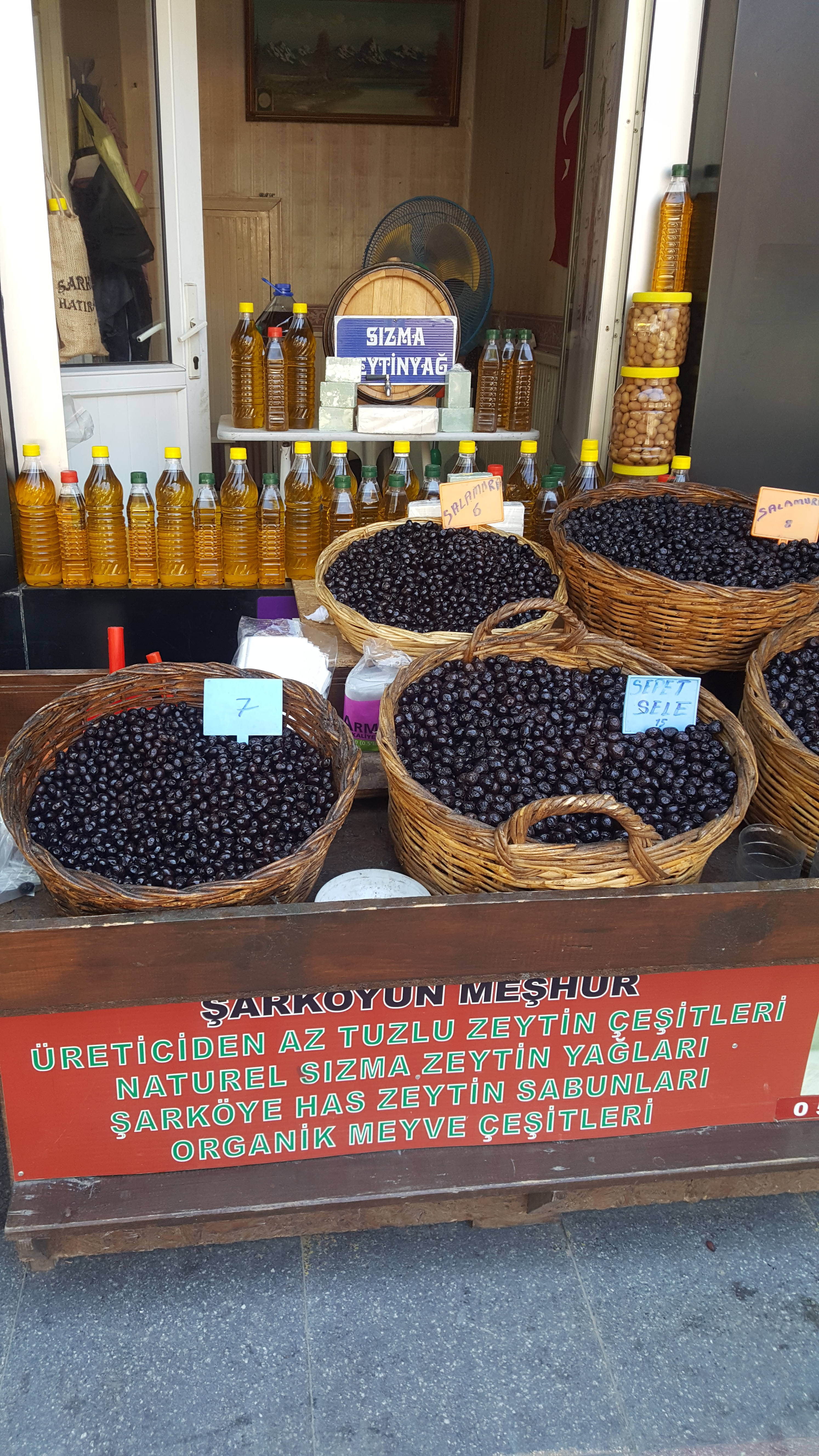 Şarköy zeytini